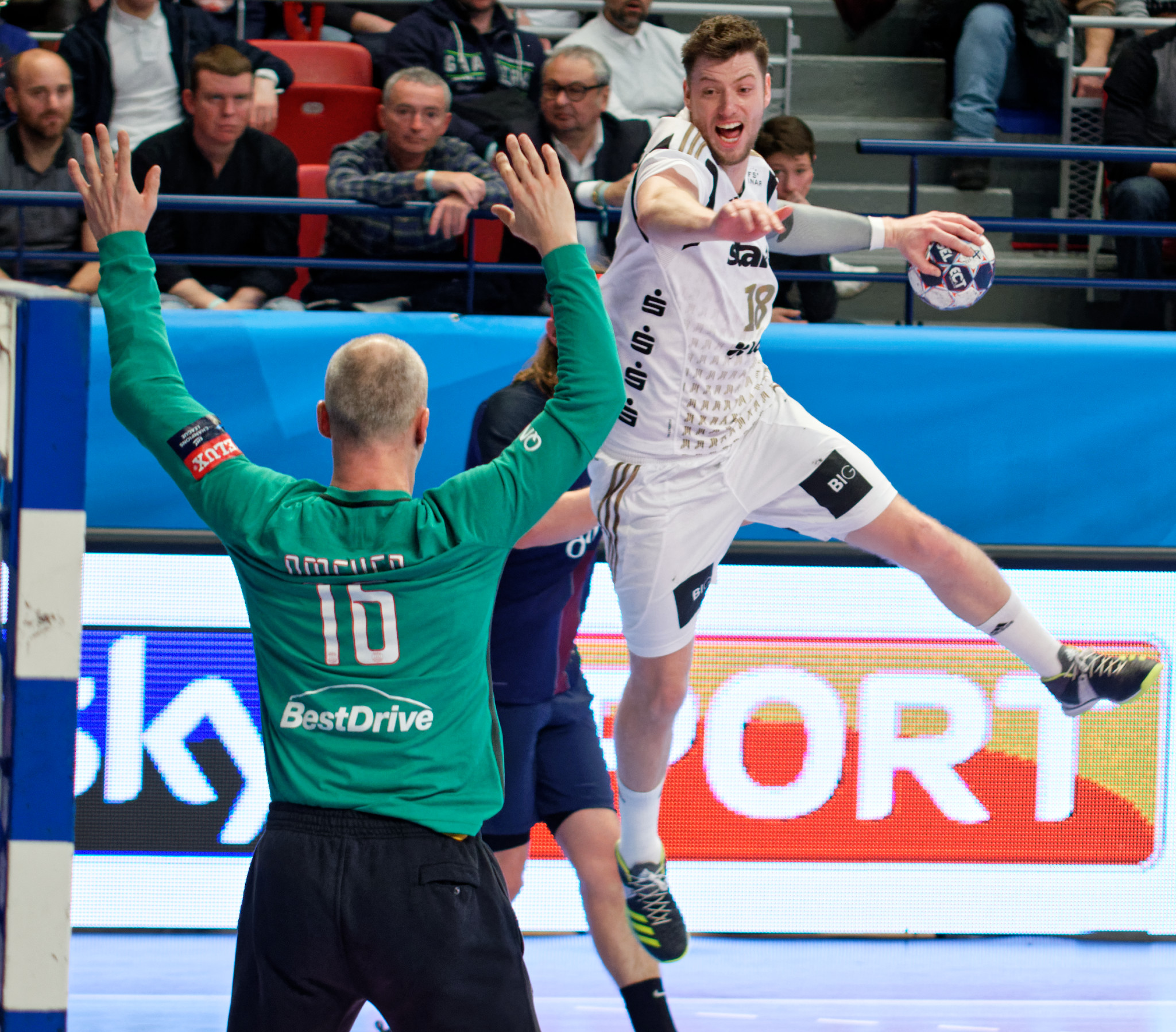 Rencontre de phase de groupe de la ligue des champions 2016-17 entre le PSG et le THW Kiel. A Coubertin, le 12 mars 2017.